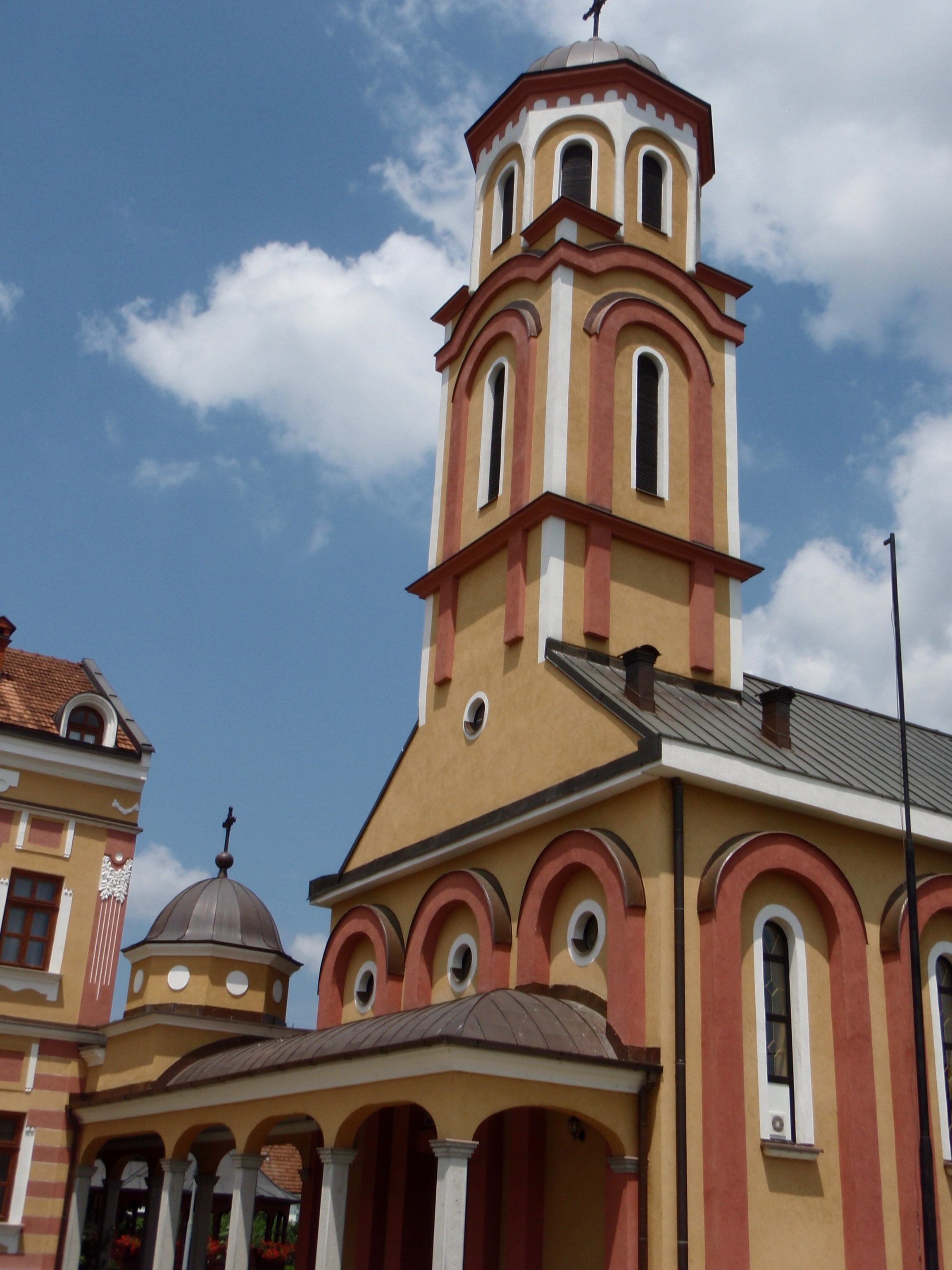 Crkva u Kozarskoj Dubici.